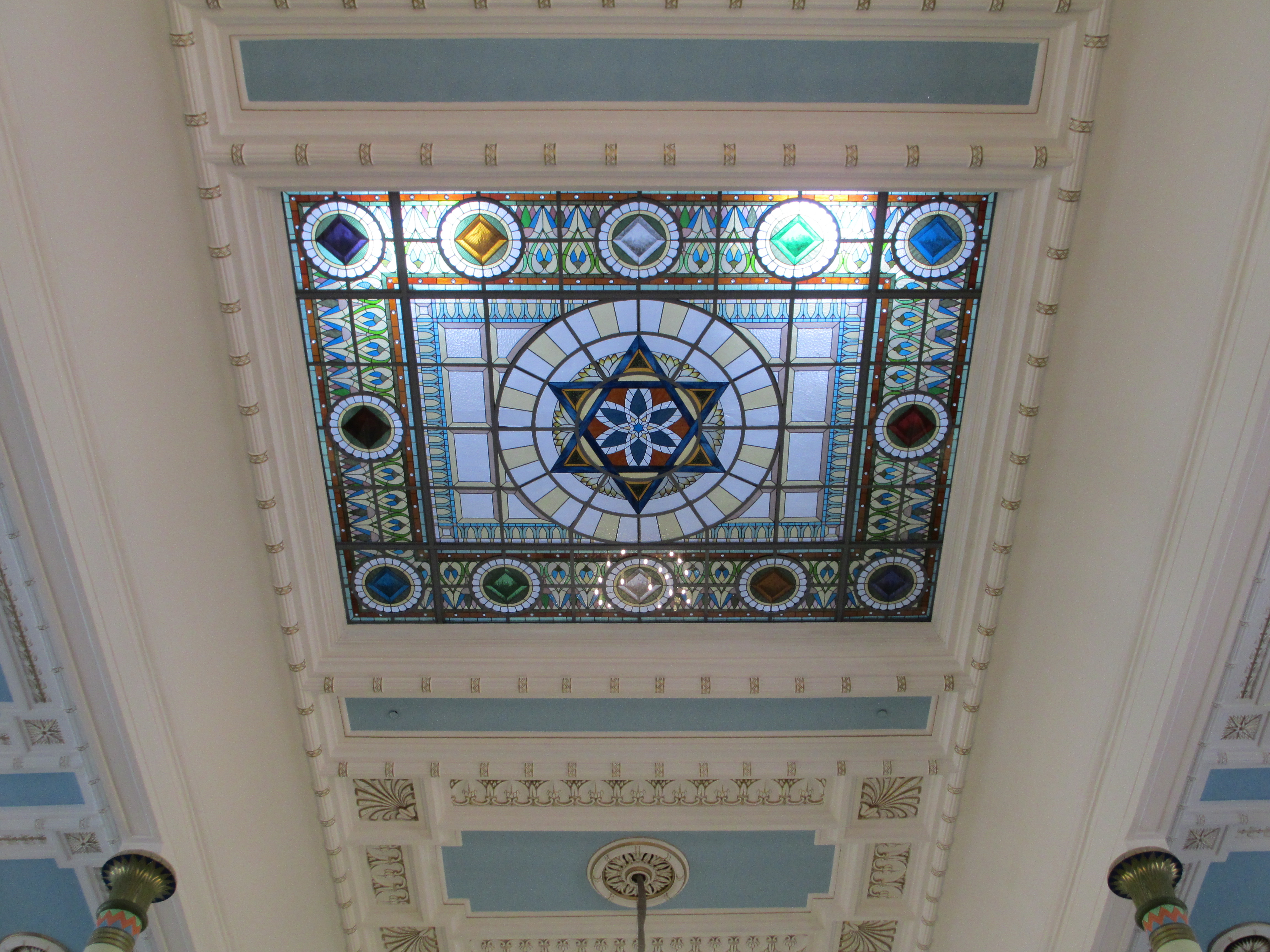 בית הכנסת פייטב בריגה